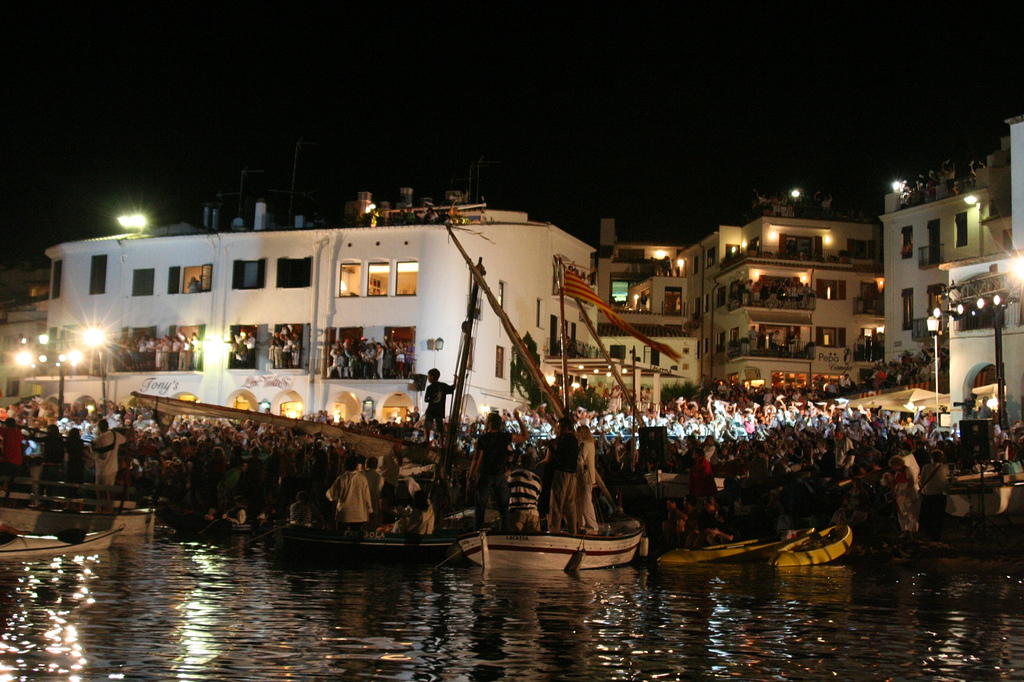 Cantada d'havaneres a la localitat de Calella de Palafrugell, al municipi de Palafrugell.